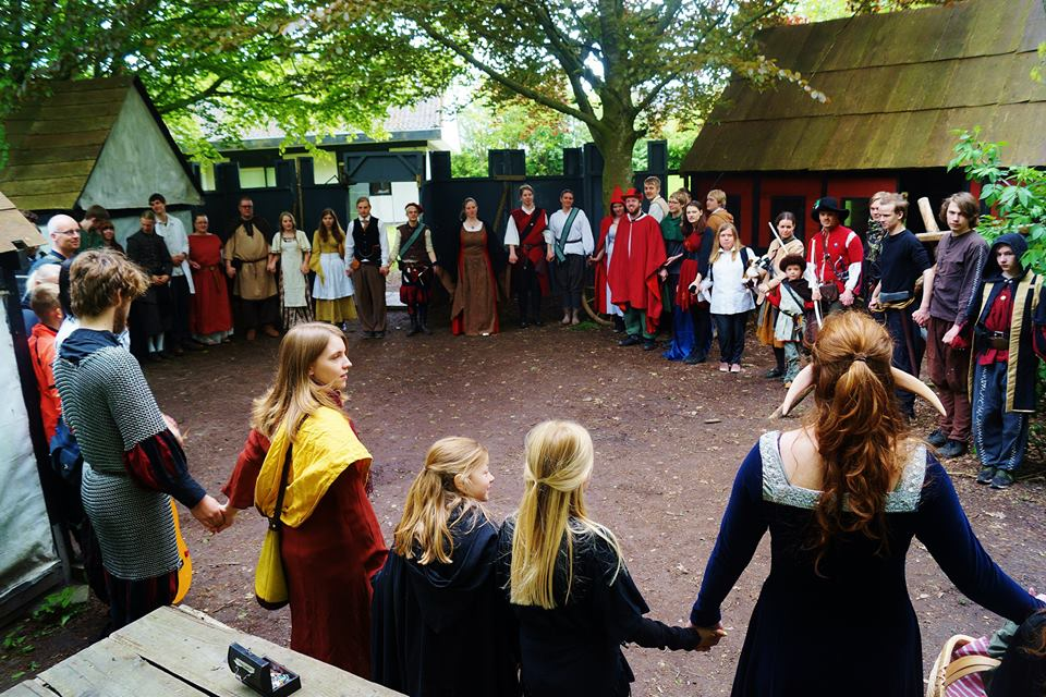 Taget til en af Fladlandssagaens spilgange